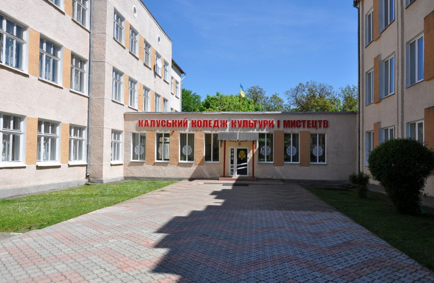 Коледж культури і мистецтв